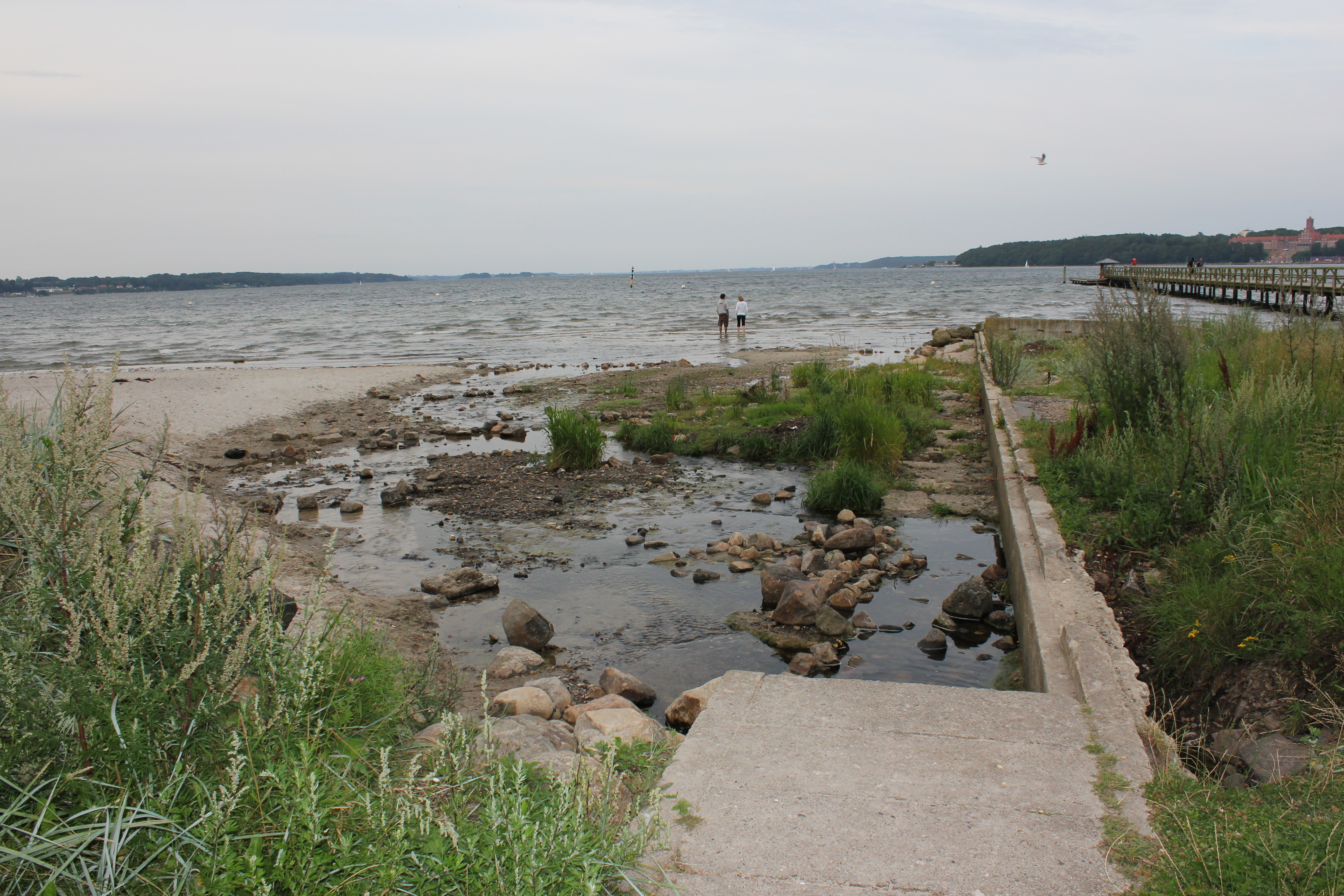 Lachsbach fließt in die Flensburger Förde (Ostseebad, Flensburg)